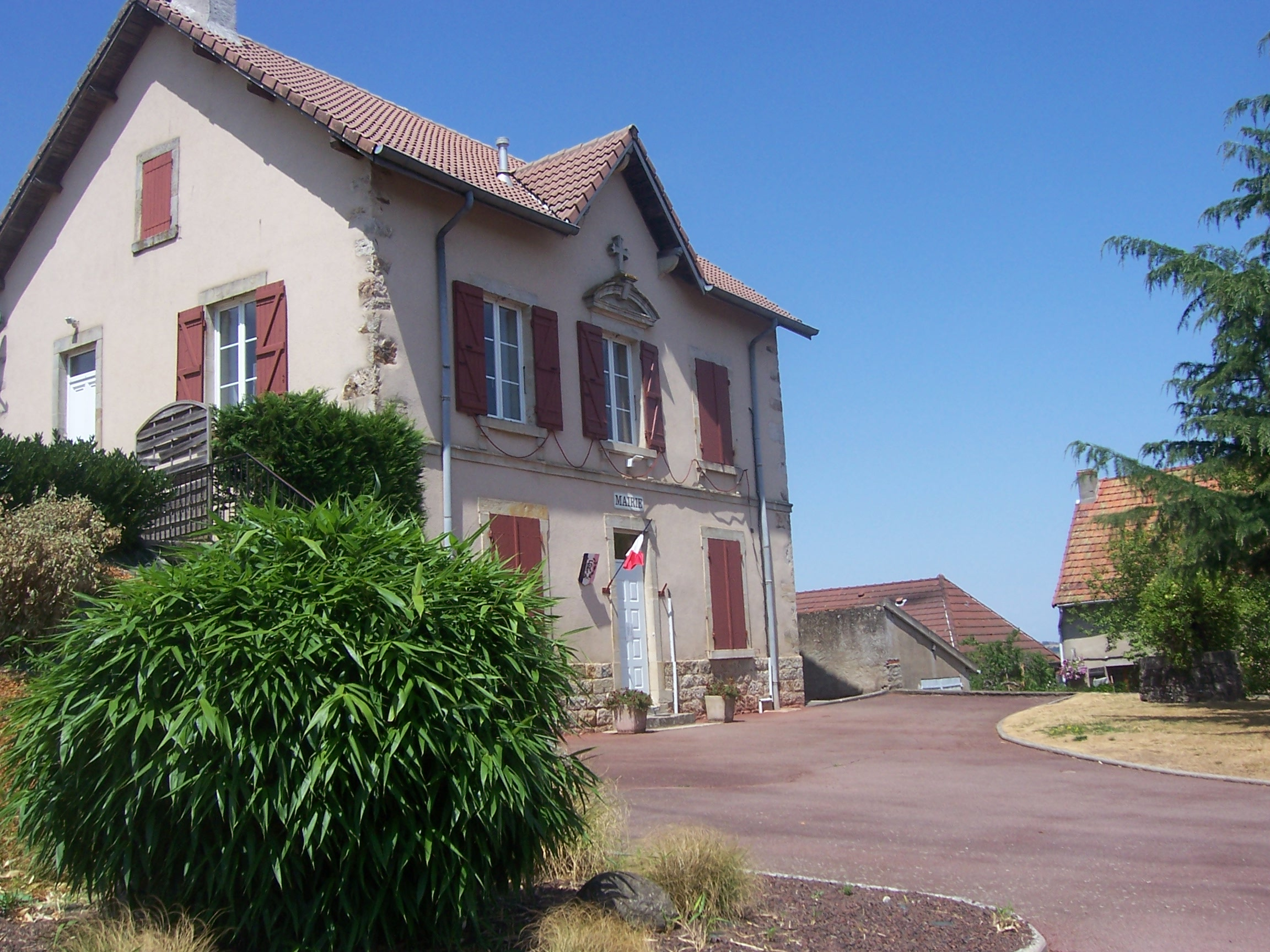 Mairie du Rousset